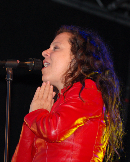 Bebel Gilberto in Flow Festival in Helsinki, Finland